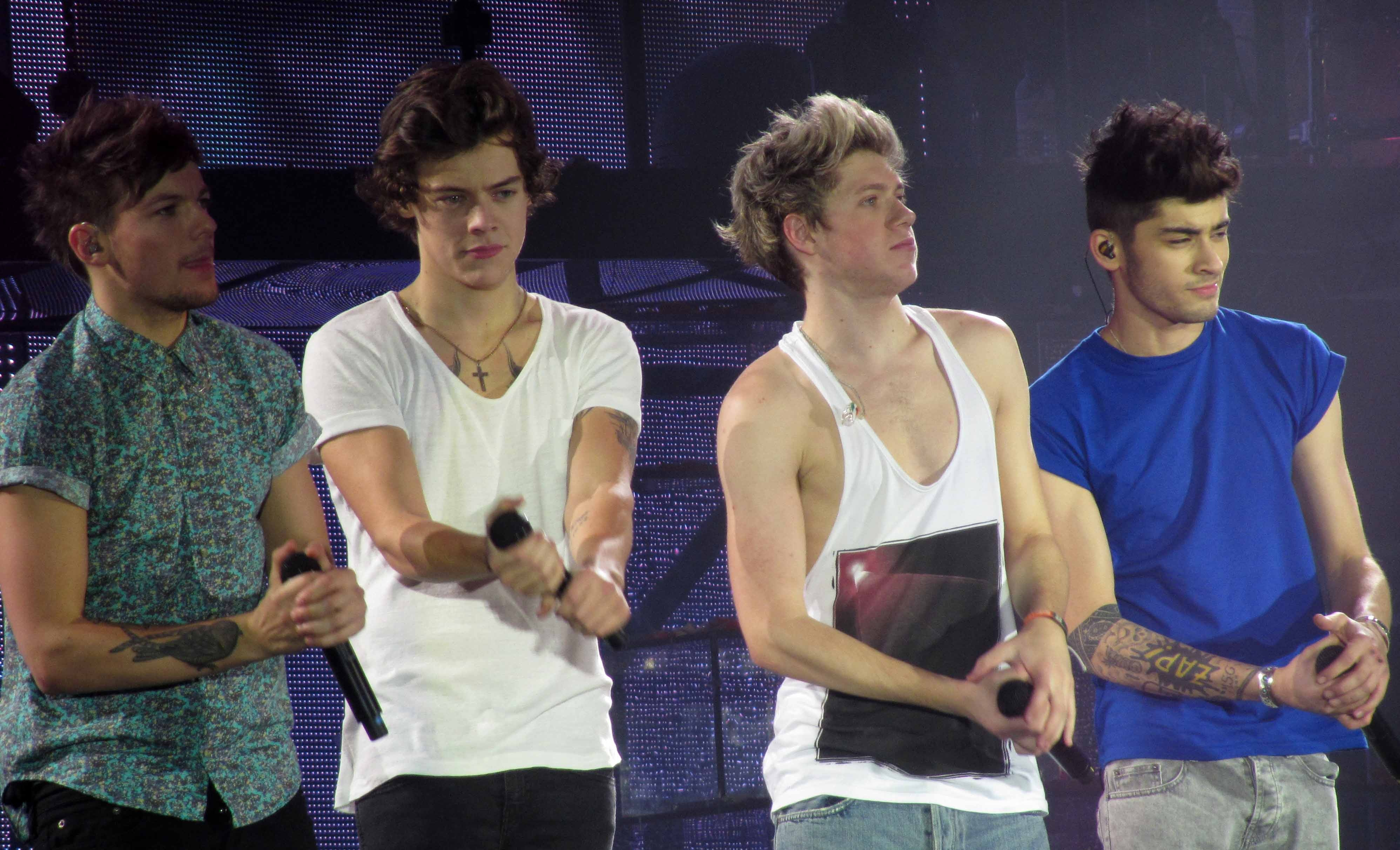 Louis Tomlinson, Harry Styles, Niall Horan y Zayn Malik en el Take Me Home Tour el 27 de febrero de 2013